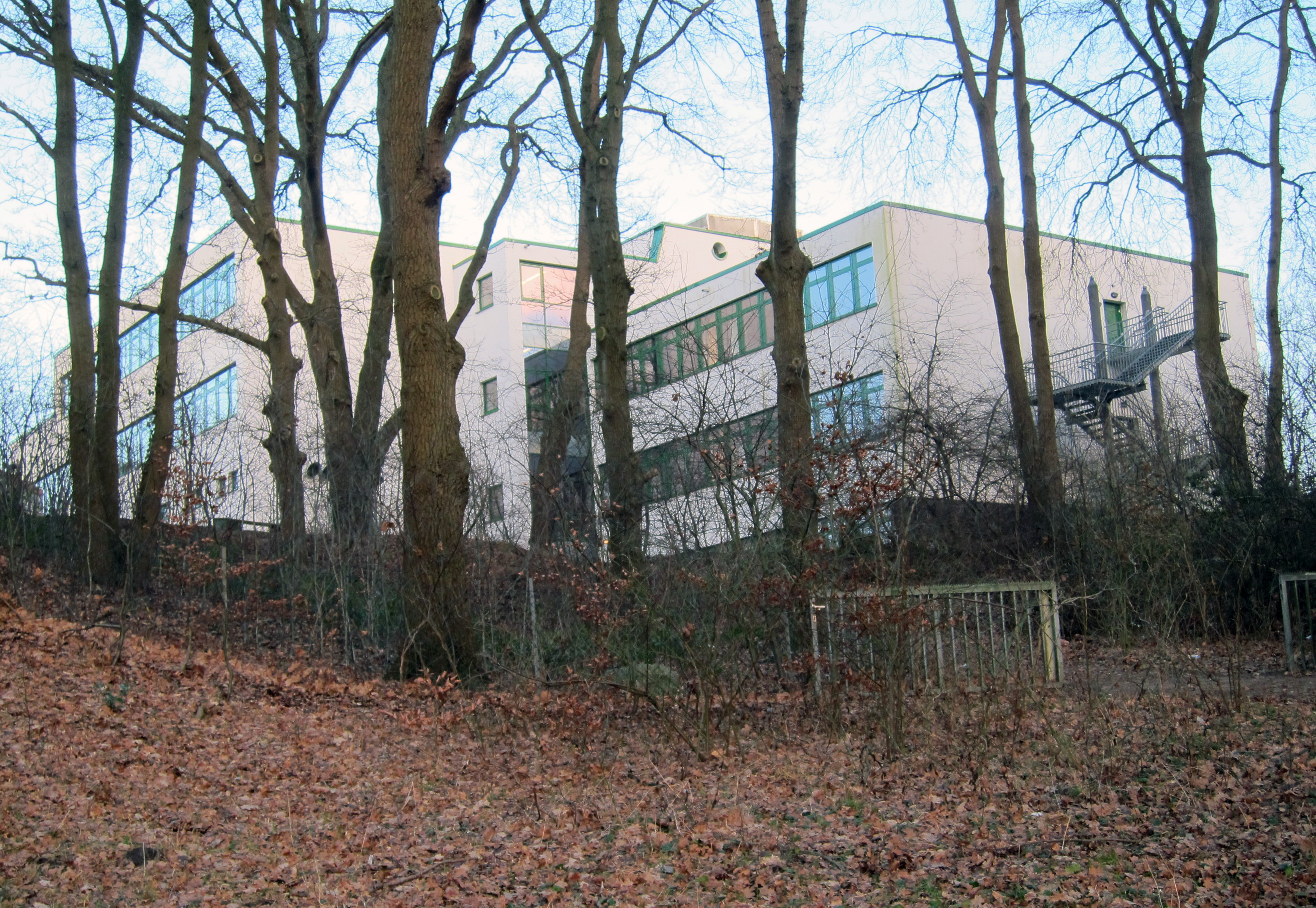 Gymnasium Oedeme, Hauptgebäude von der Bachaue aus